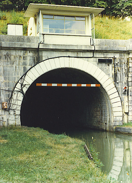 Photo du Tunnel de Mont de Billy.